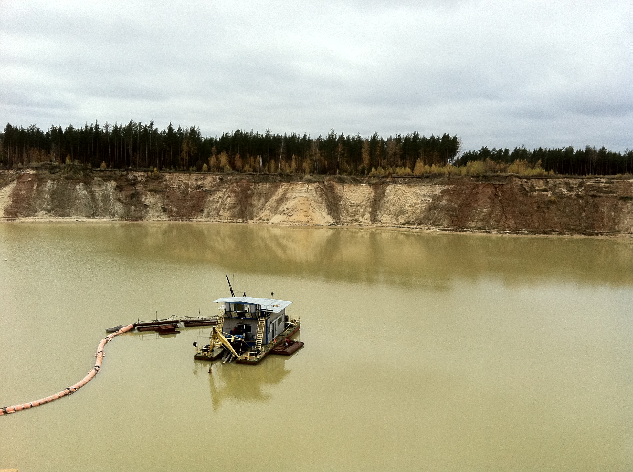 Добыча песка на Бурцевском месторождении